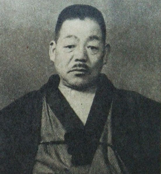 玉井金五郎（火野葦平の父。『花と竜』の主人公）